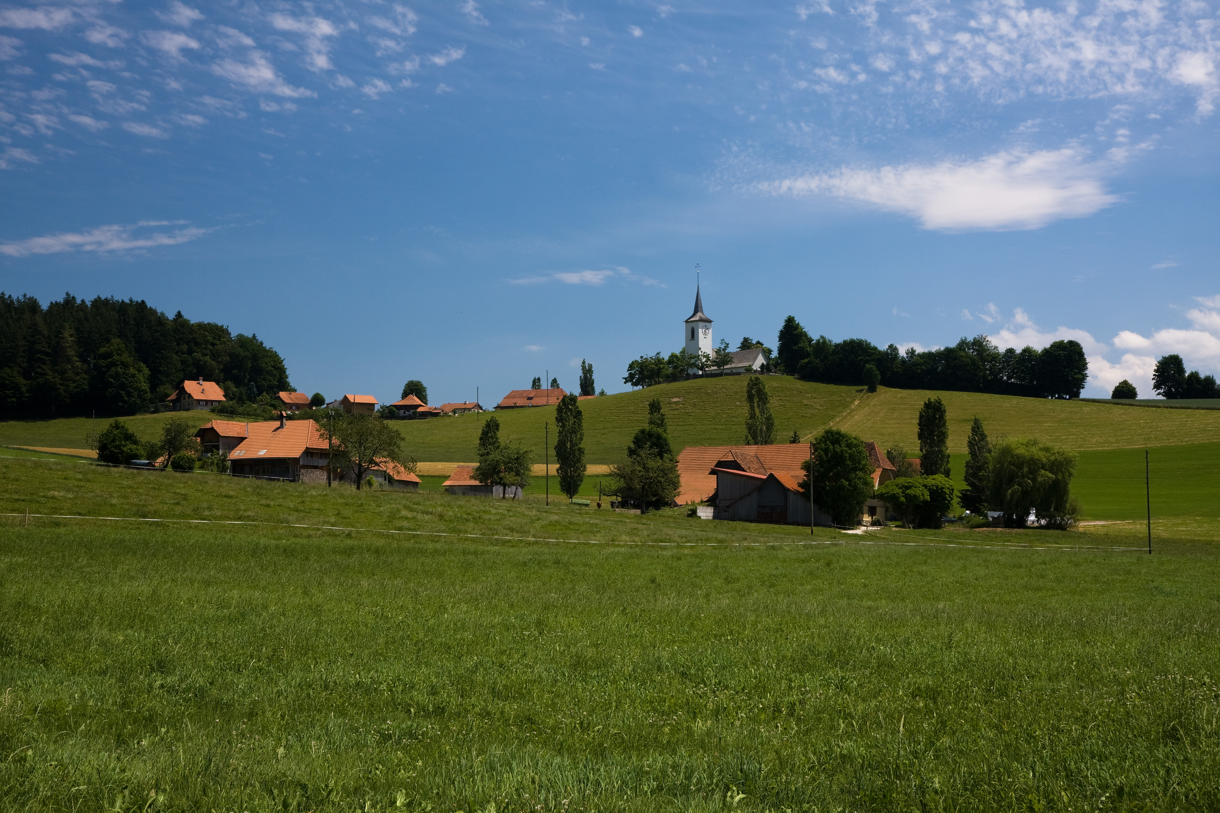 Der Weiler Wahlern mit Kirche, Schweiz